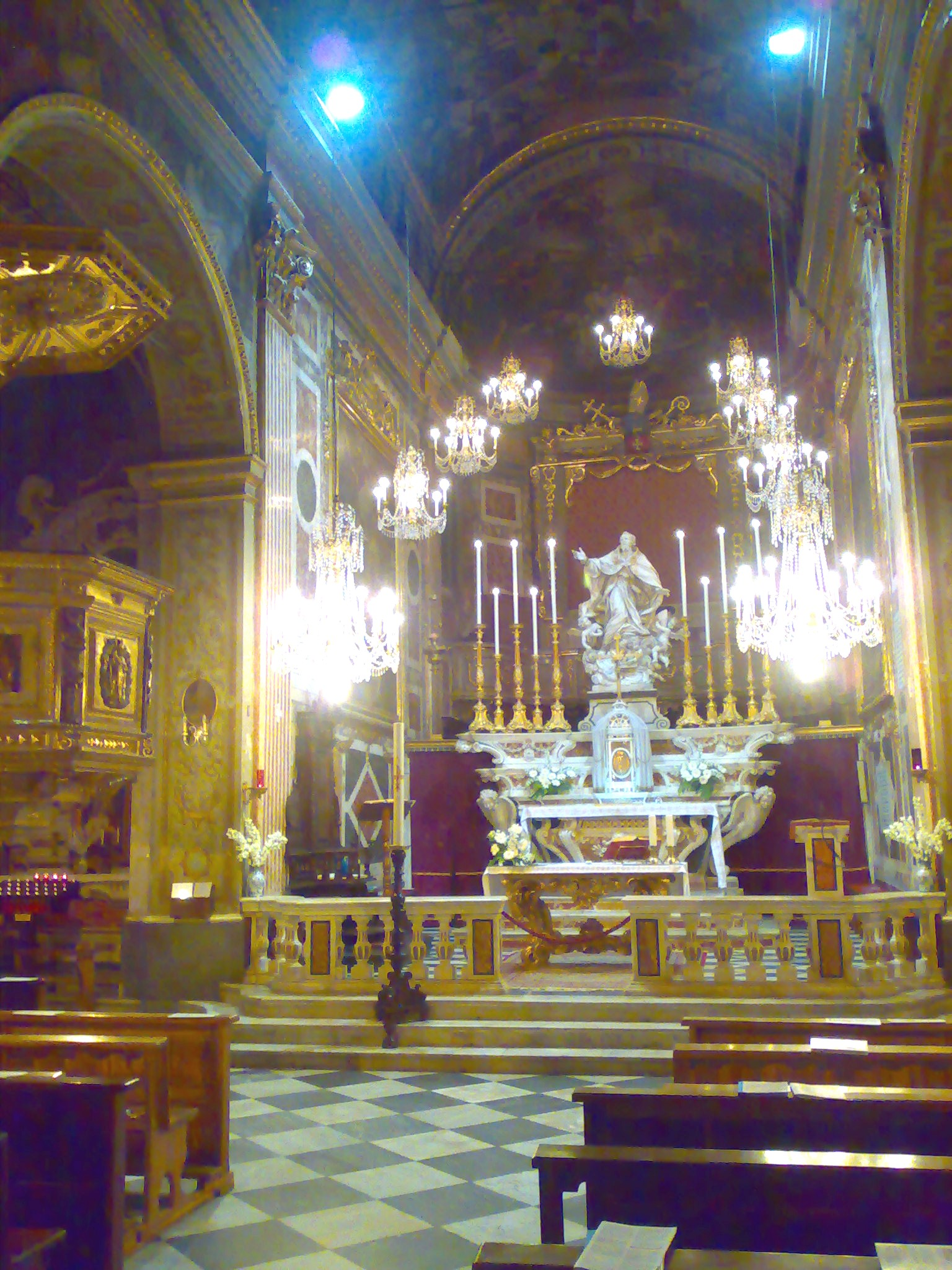 Chiesa di San Nicolò in Albisola Superiore SV, presbiterio (Italy)